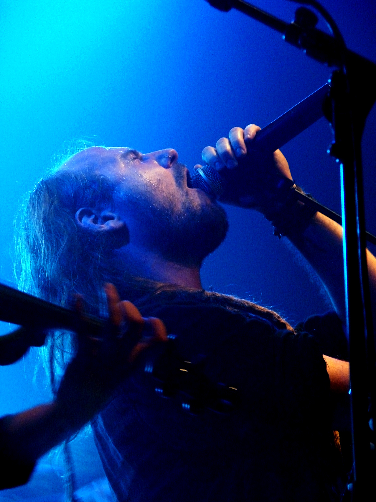 Eluveitie au Cernunnos Fest 07, le 16/12/07 à la Locomotive, Paris.